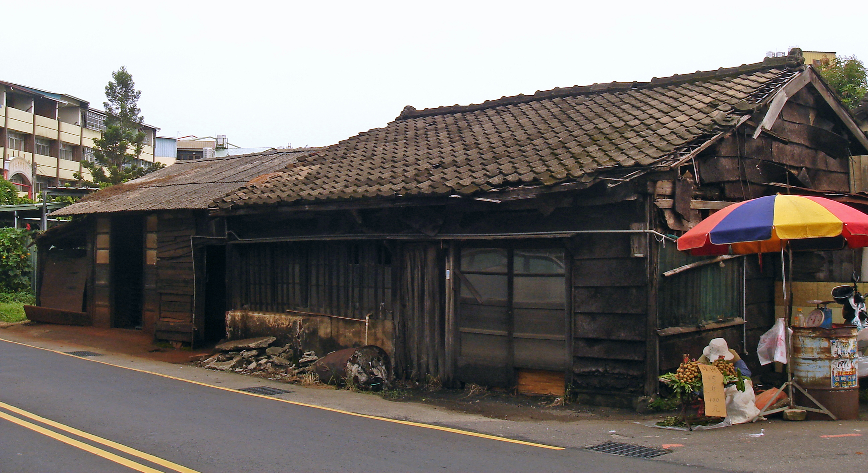 中濁線太平驛